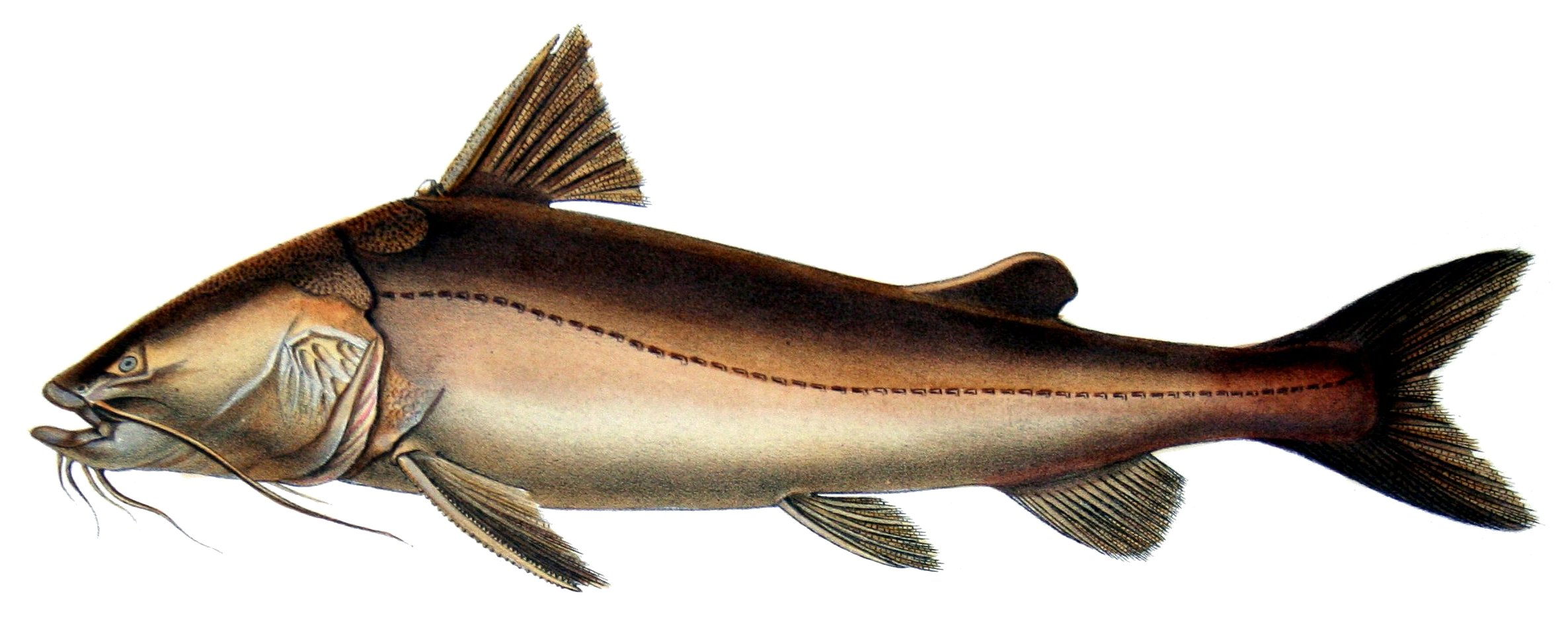 Bagrus valenciennei Cast. = Ariidae cf. Sciades, Notarius